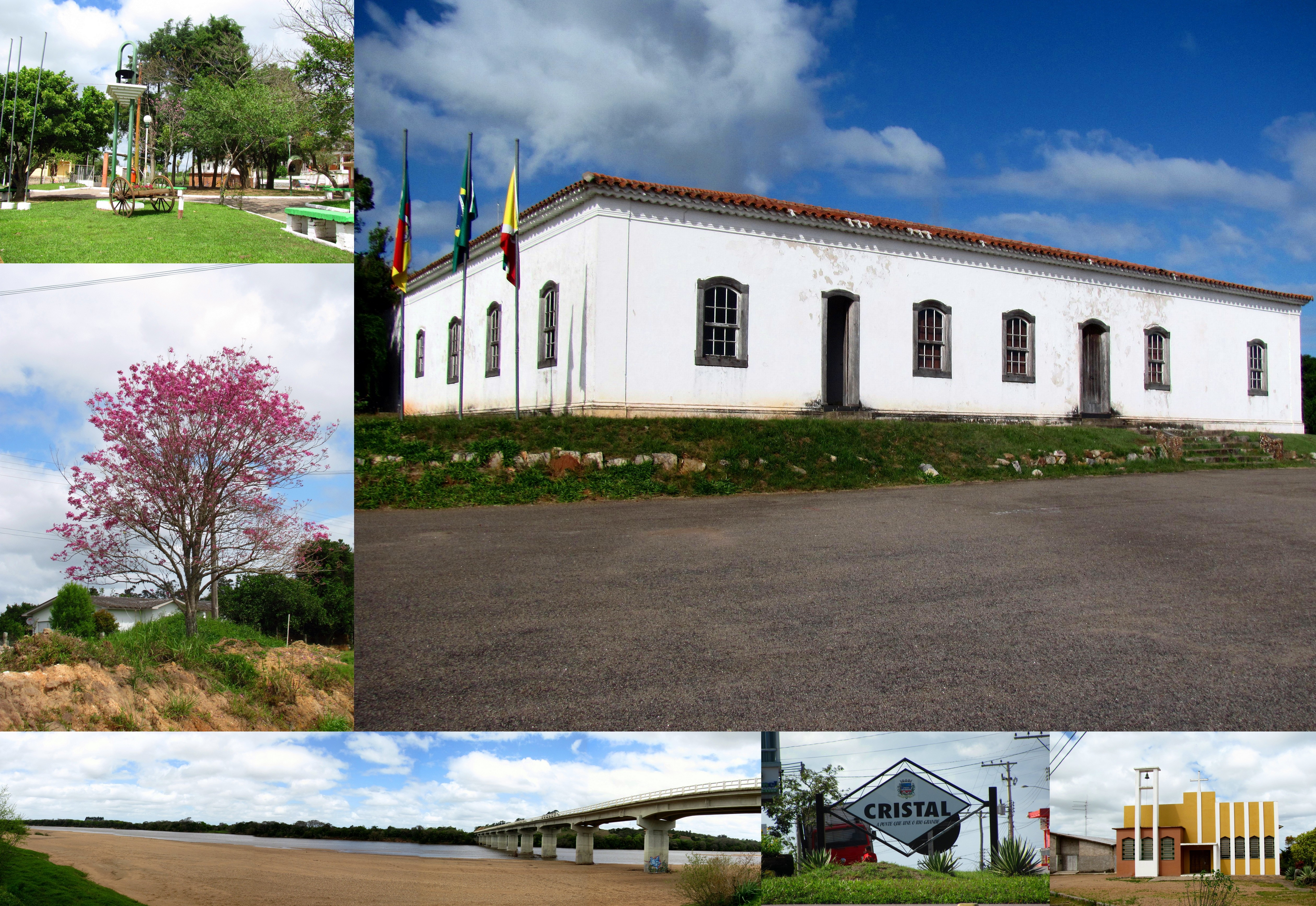 Montagem com Praça Otilia Bauermann Schlabitz, Parque Bento Gonçalves, Árvore em Cristal, Praia sob a ponte do Rio Camaquã, Portal de Cristal e Igreja Sagrada Família. Todas as fotos são de minha autoria.